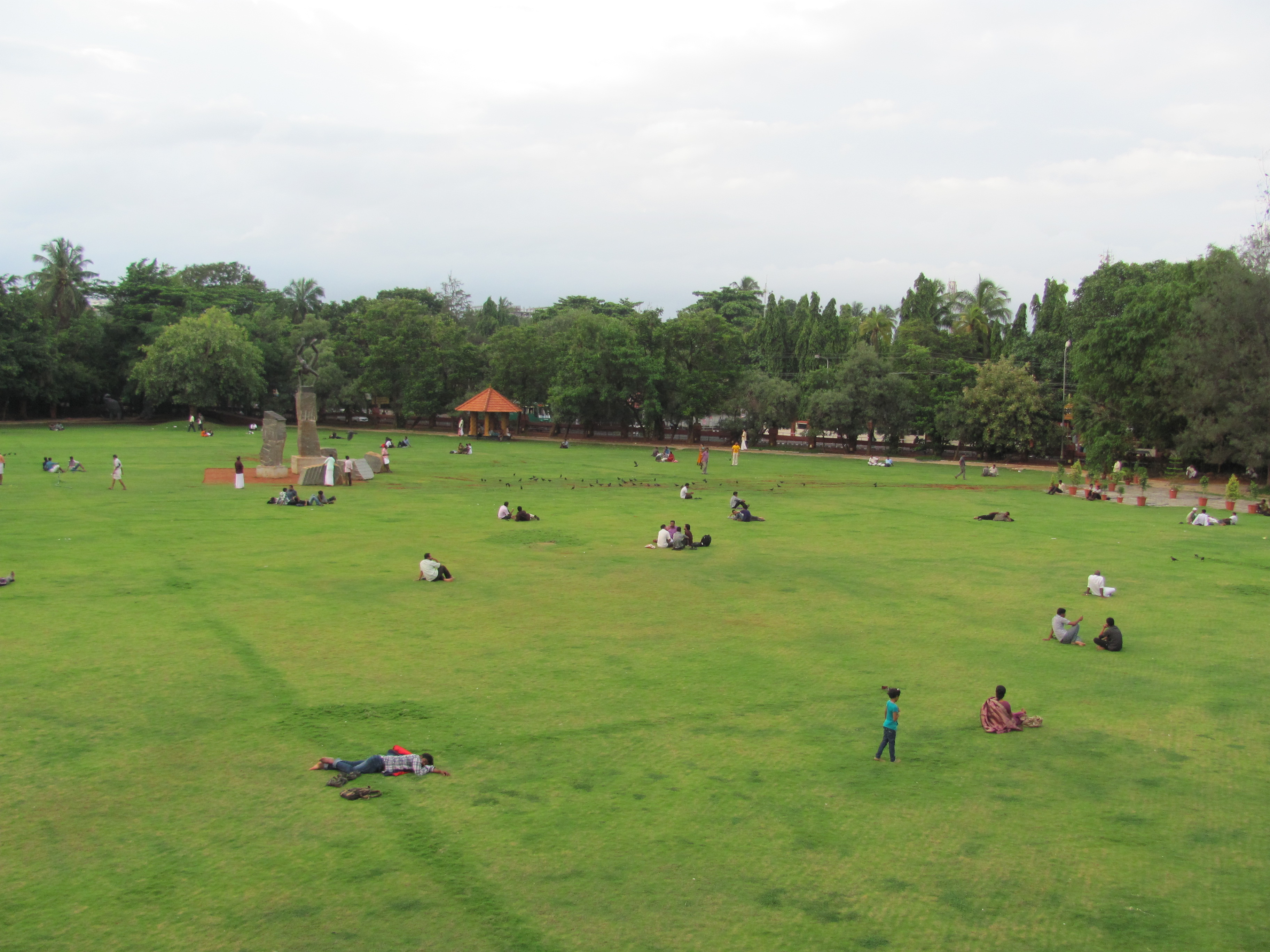 മാനാഞ്ചിറ മൈതാനം, കോഴിക്കോട്